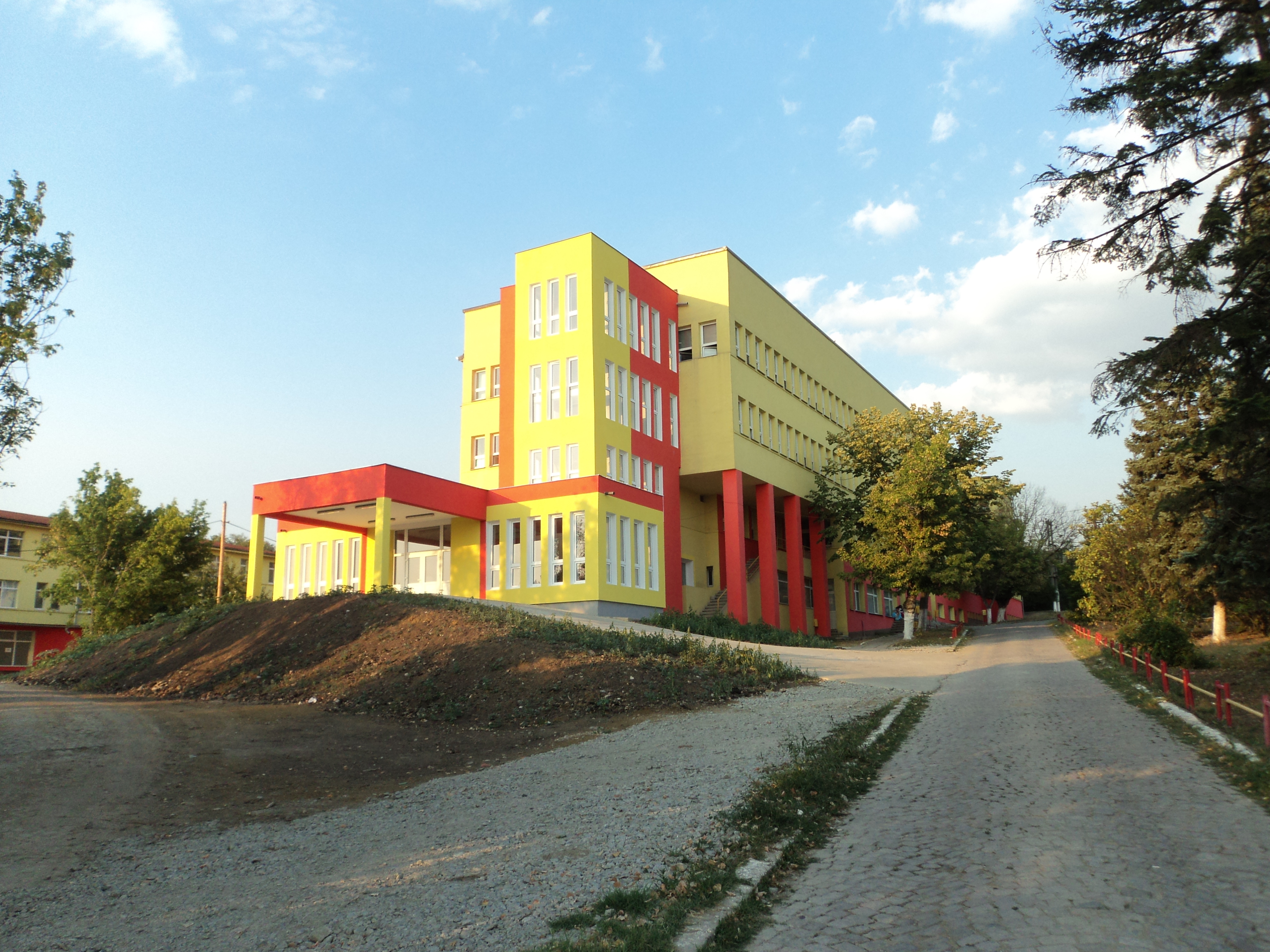 4000.3000, 4 MB